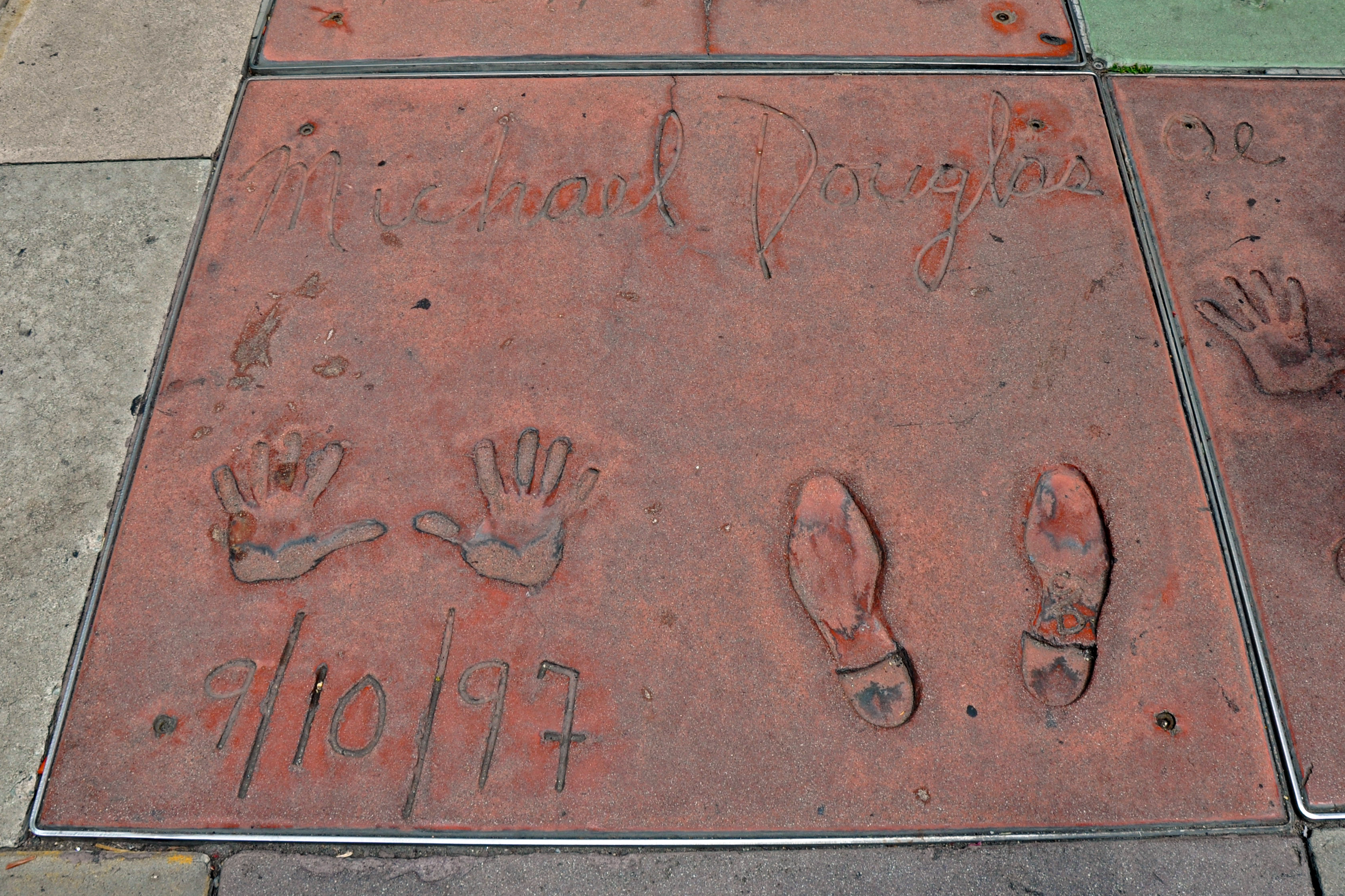 Impronte di Michael Douglas al TCL Chinese Theatre di Los Angeles, USA, Agosto 2011